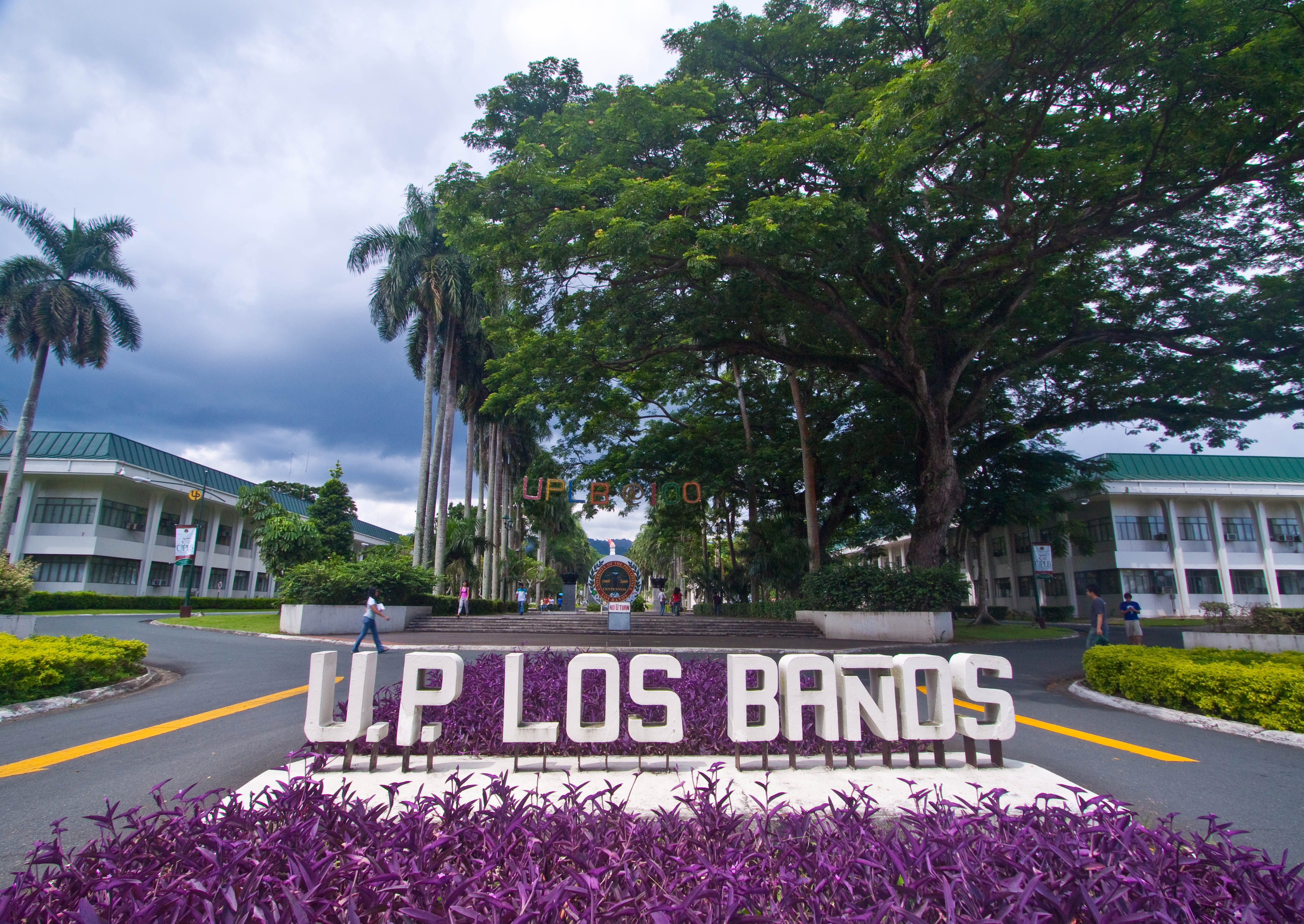 UPLB Gate